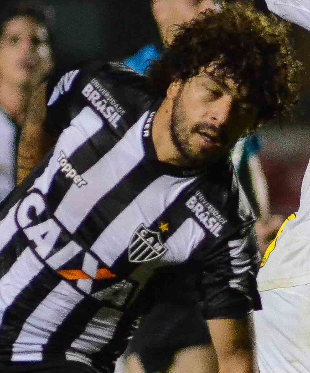 Nenê no São Paulo em 2018